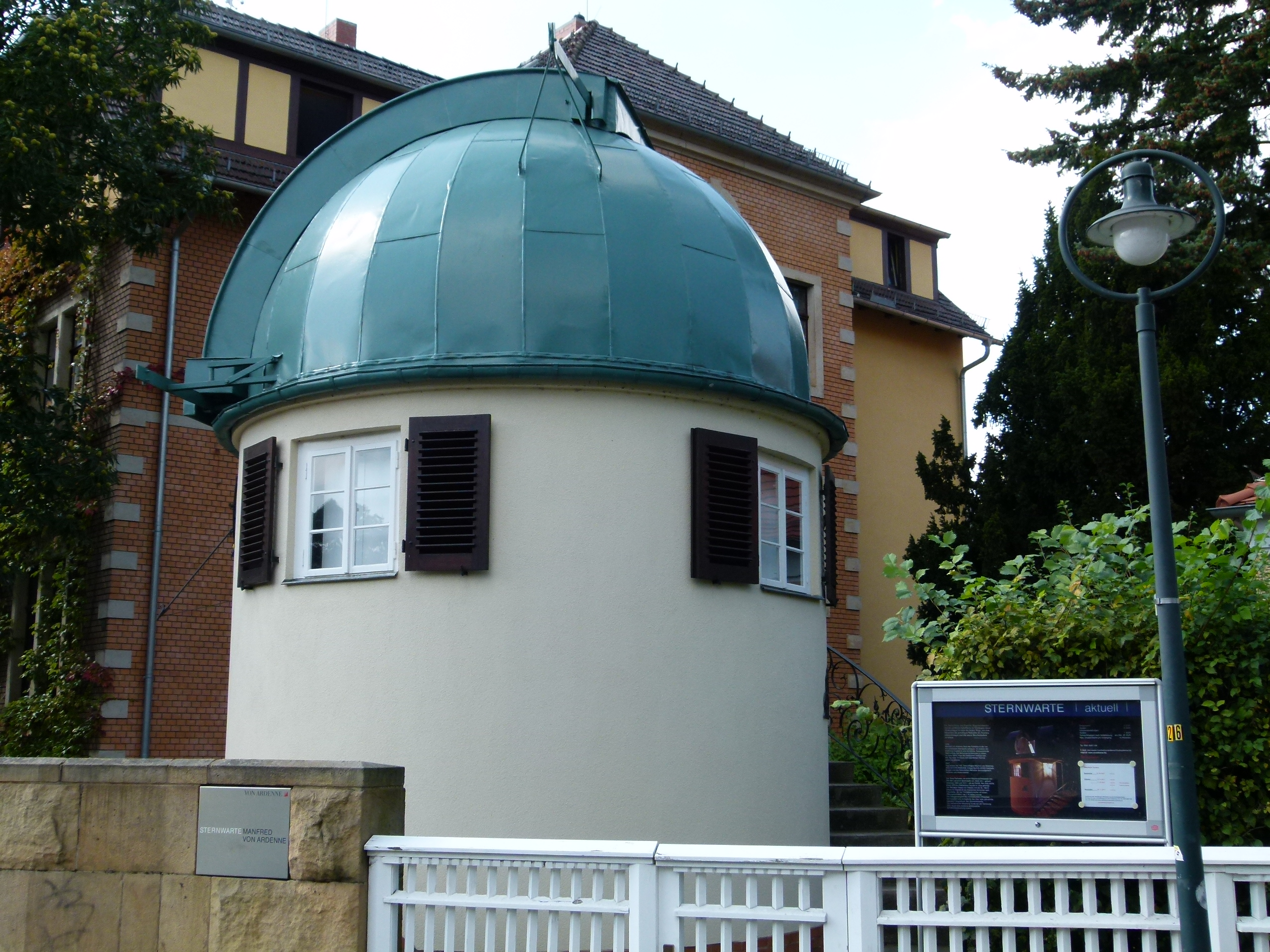 Sternwarte Manfred v. Ardenne in Loschwitz, Plattleite 27, Dresden